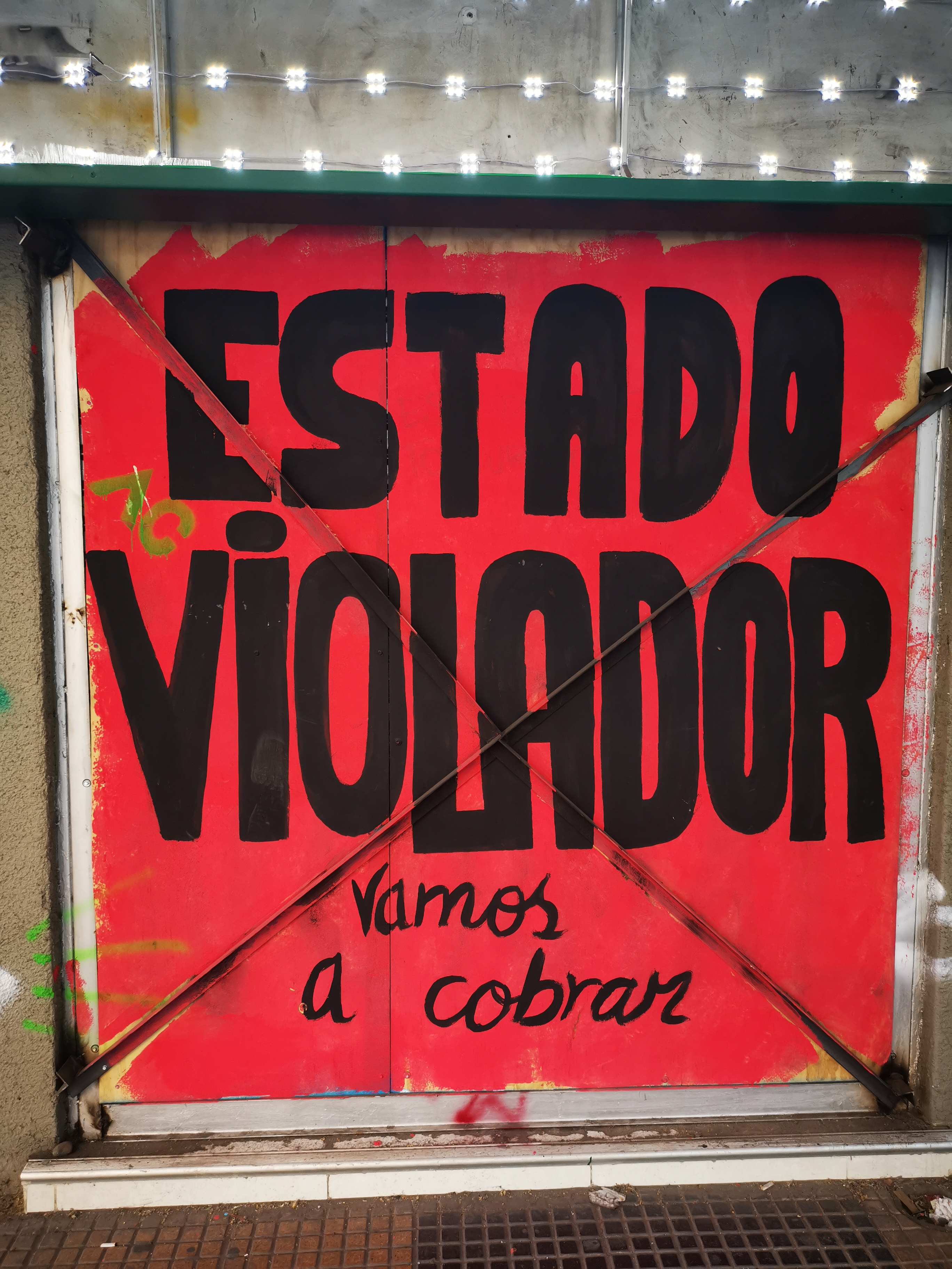 Intervención urbana realizada durante las protestas de 2019 en Chile.